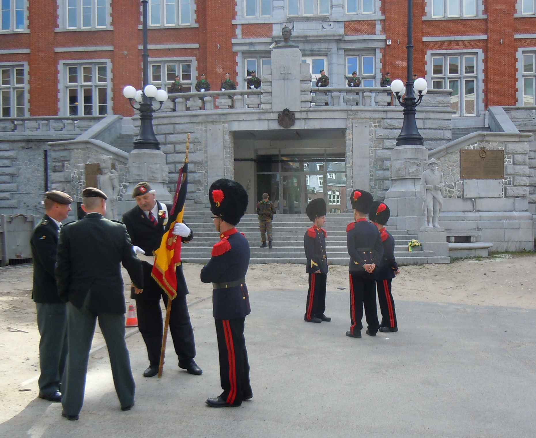 Grenadiers, herdenking monument Brussel